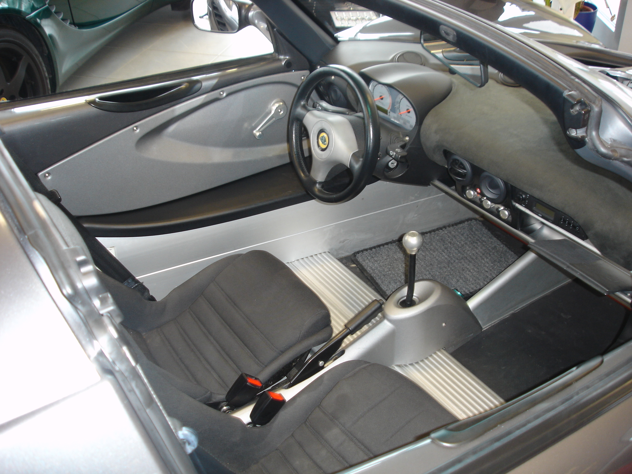 Innenraum eines Lotus Elise